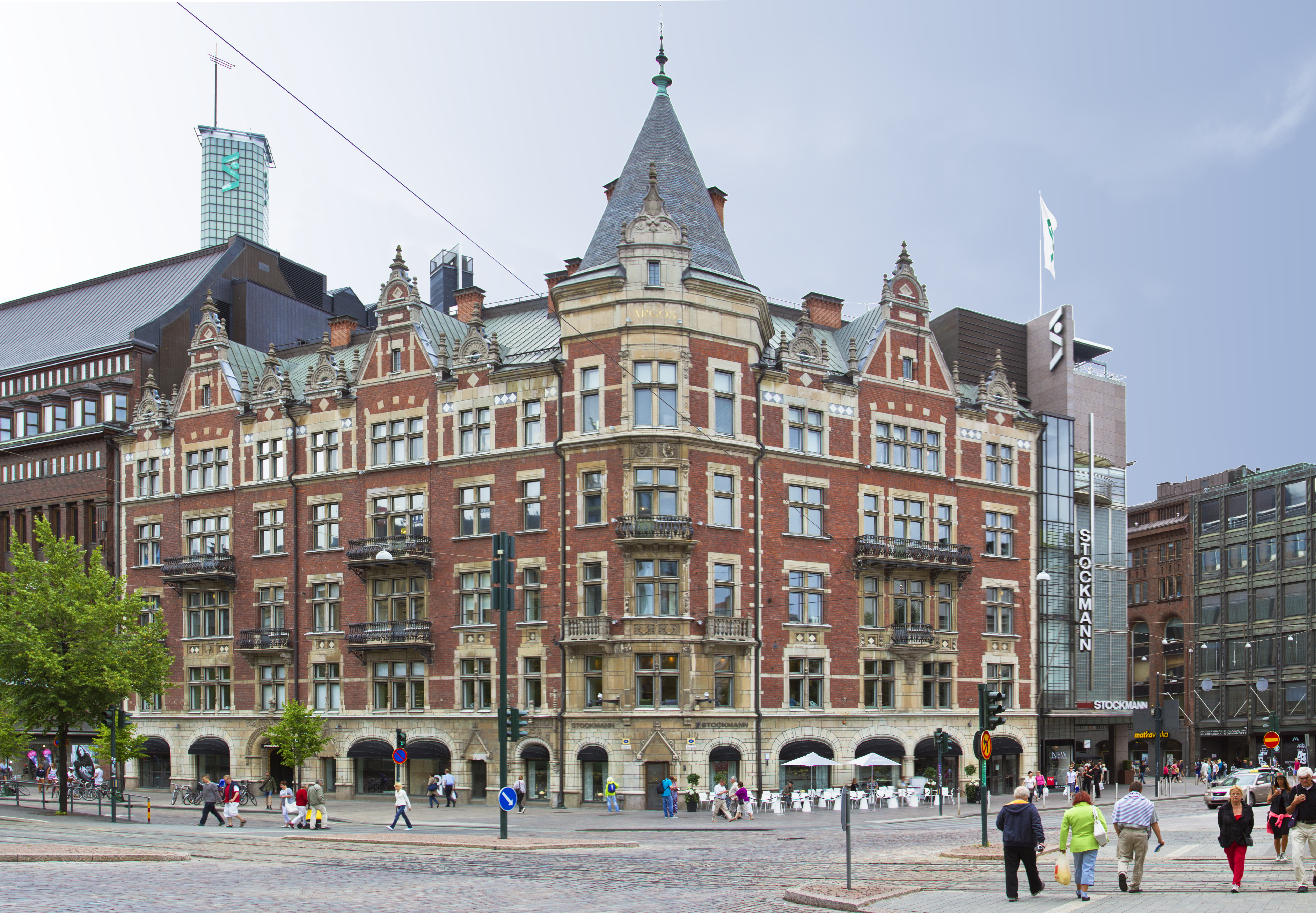 Argoksen talo 2013.